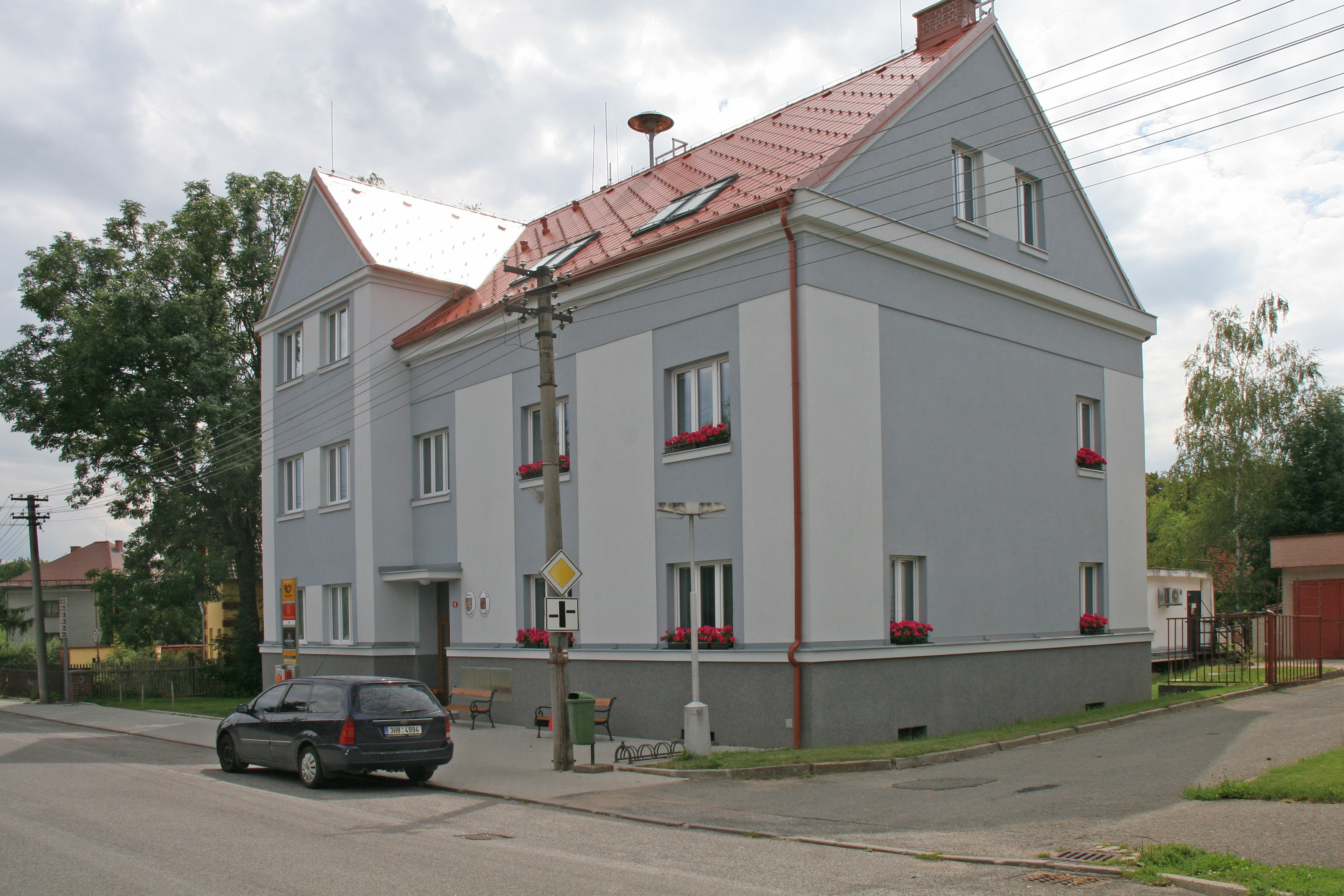 Všestary obecní úřad